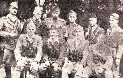 Štab 2. bataljona Šercerjeve brigade v Tihaboju. Od leve na desno sedijo: Mirko-namestnik komandanta bataljona, Jože Mirtič-Zidar-komandant bataljona, Radoš -komisar bataljona. Zvone-namestnik komisarja bataljona. Stojijo: borci 2. bataljona